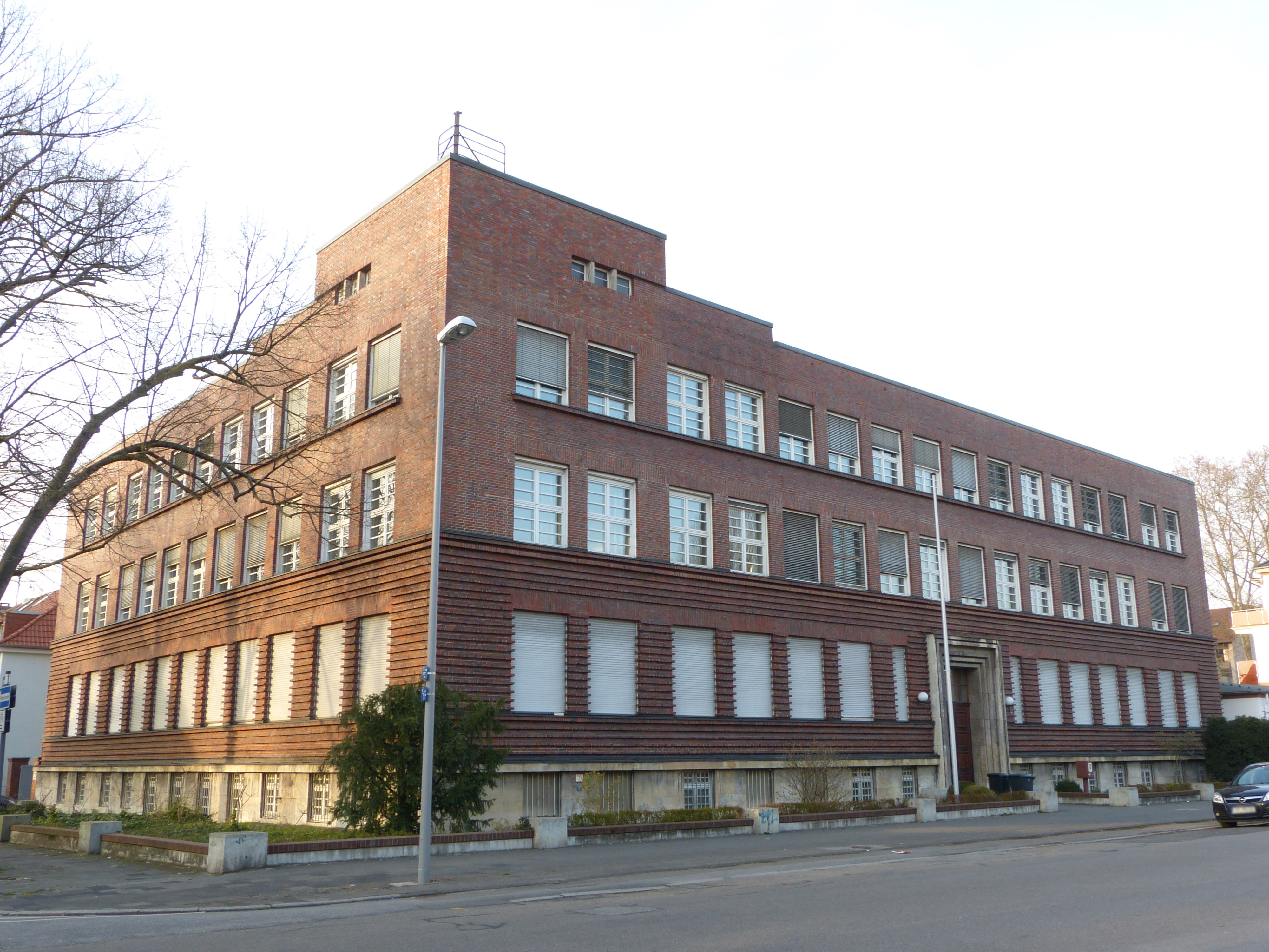 Ludwigshafen Mundenheimer Straße 149: dreigeschossiger expressionistisch-sachlicher Kubus auf L-förmigem Grundriss, erhöhte Ecke, 1926/27, Architekt Rudolf Brüning, Düsseldorf; stadtbildprägend